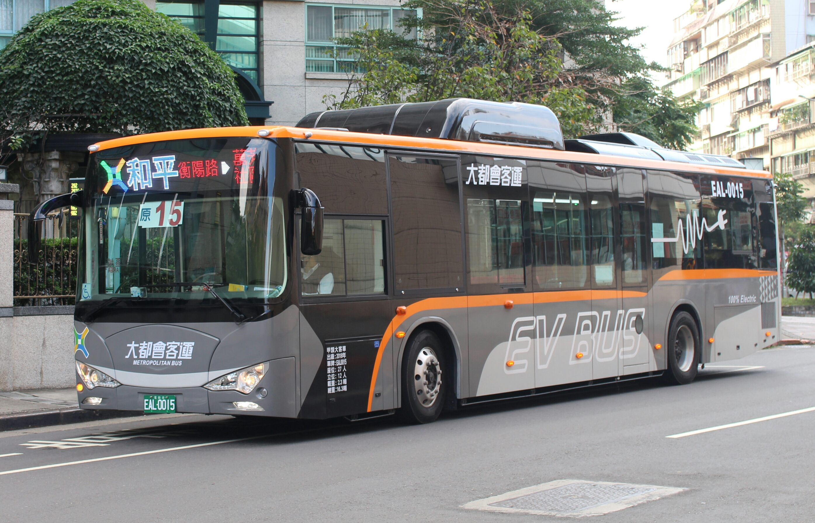 大都會客運 凱勝綠能 BYD K9A EAL-0015 和平幹線 純電能電動低地板公車